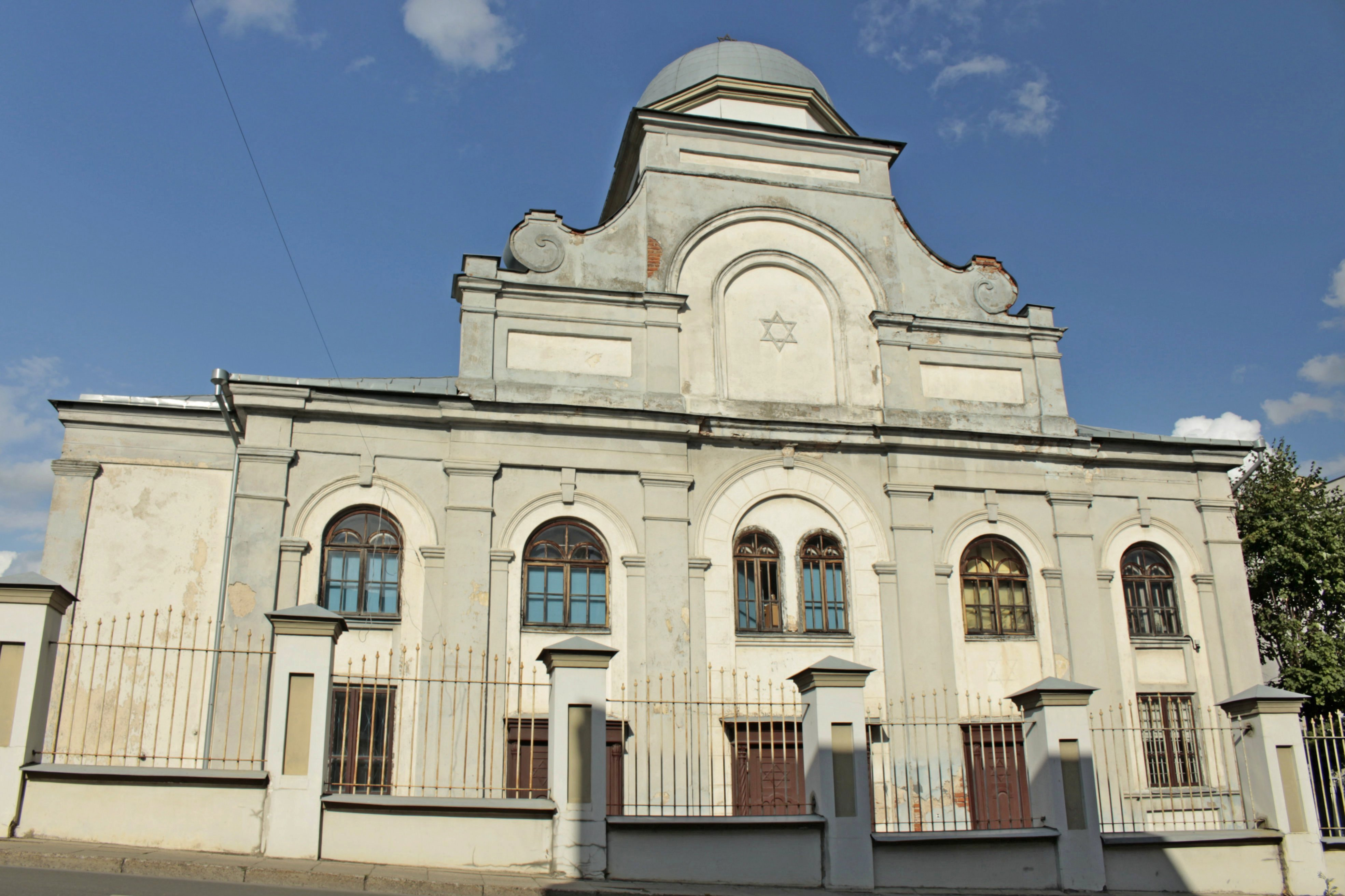 Kauno choralinė sinagoga